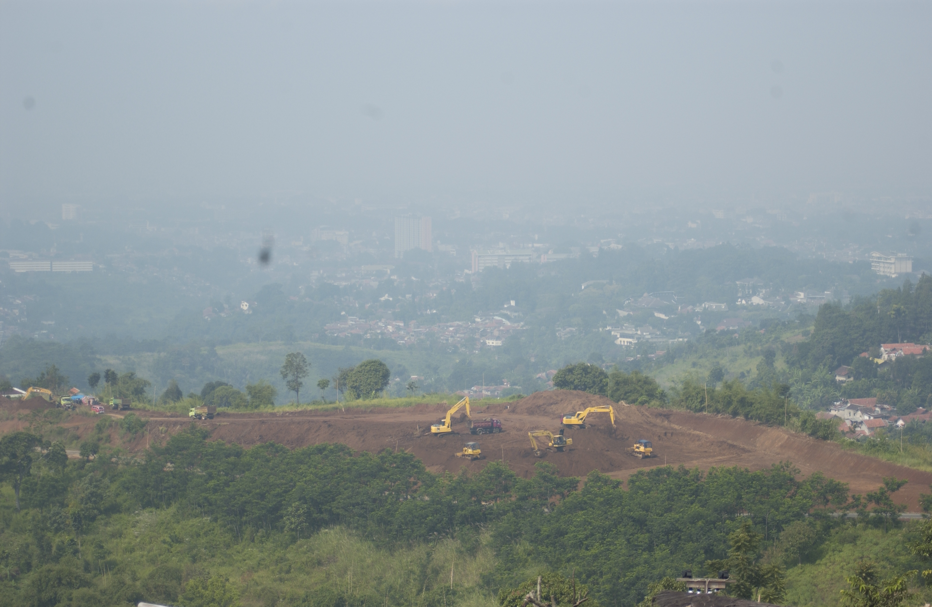 Selain dikenal sebagai kawasan wisata, kawasan Punclut juga dikenal oleh masyarakat sebagai satu kawasan kontroversional di kota Bandung karena menyebabkan banyak konflik. Konflik yang terjadi di kawasan Punclut ini bermula sejak tahun 1961 saat pemerintah memberikan Hak Milik Tanah Kawasan Punclut kepada 948 pejuang Republik Indonesia dengan syarat mereka akan membangun rumah dalam waktu lima tahun, padahal saat itu Punclut memang disiapkan untuk menjadi daerah hutan lindung Namun tanah tersebut tidak dibangun rumah dalam waktu yang lama. Akibatnya, banyak warga yang membangun rumah di daerah tersebut. Di tambah lagi pada tahun 1994, sebuah perusahaan swasta diberikan izin untuk mengembangkan dan membangun perumahan di Punclut dan memohon Hak Guna Bangunan agar dapat membangun Kawasan Punclut. Mulai saat itu muncul pro dan kontra mengenai pembangunan Kawasan Punclut. Di tengah masalah tersebut, muncul pula rencana dari pemerintah dengan menggandeng pihak swasta untuk membangun jalan raya di Kawasan Punclut supaya mempermudah perpindahan masyarakat di kawasan Bandung. Sebenarnya pada tahun 2004, Pemerintah Kota Bandung telah menetapkan Punclut sebagai kawasan paru-paru kota Bandung bahkan menjadi kawasan hutan lindung sesuai dengan Perda Kota Bandung Nomor 2 tahun 2004 tentang tata ruang kota Bandung. [6] Namun di pada tahun 2005, terjadi pembangunan di daerah Punclut. Tentu saja hal ini mengundang kontroversi di tengah masyarakat karena pembangunan di Punclut merupakan tindakan yang melanggar undang-undang. Bahkan karena pembangunan-pembangunan ini, kawasan Punclut seringkali dianggap sebagai penyebab terjadinya banjir di aliran Sungai Cikapundung karena kerusakan kawasan ini yang sudah beralih menjadi kawasan komersil.